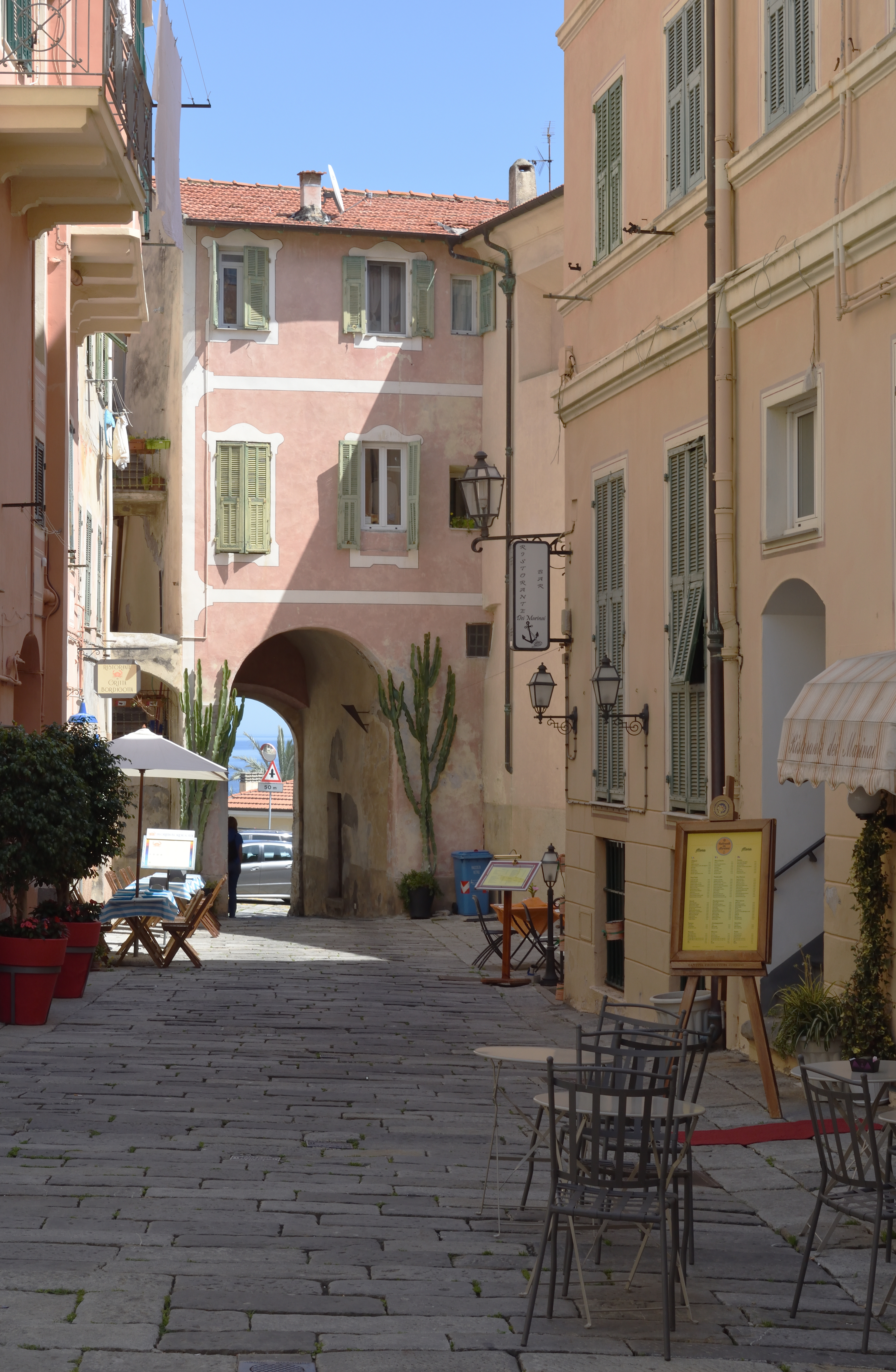 Bordighera, a mezzogiorno nella città vecchia